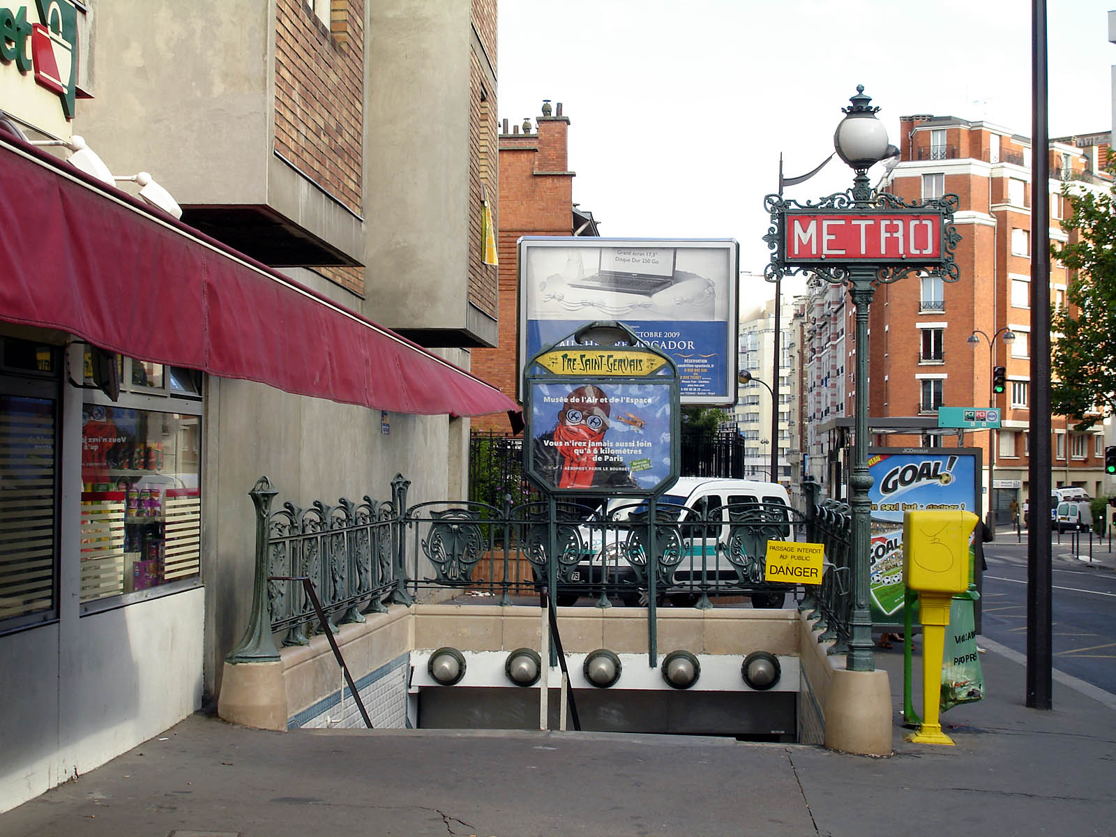 Station Pré-Saint-Gervais de la ligne 7 bis du métro de Paris, France.